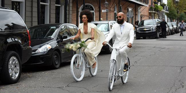 ift.tt/1zeC2kg